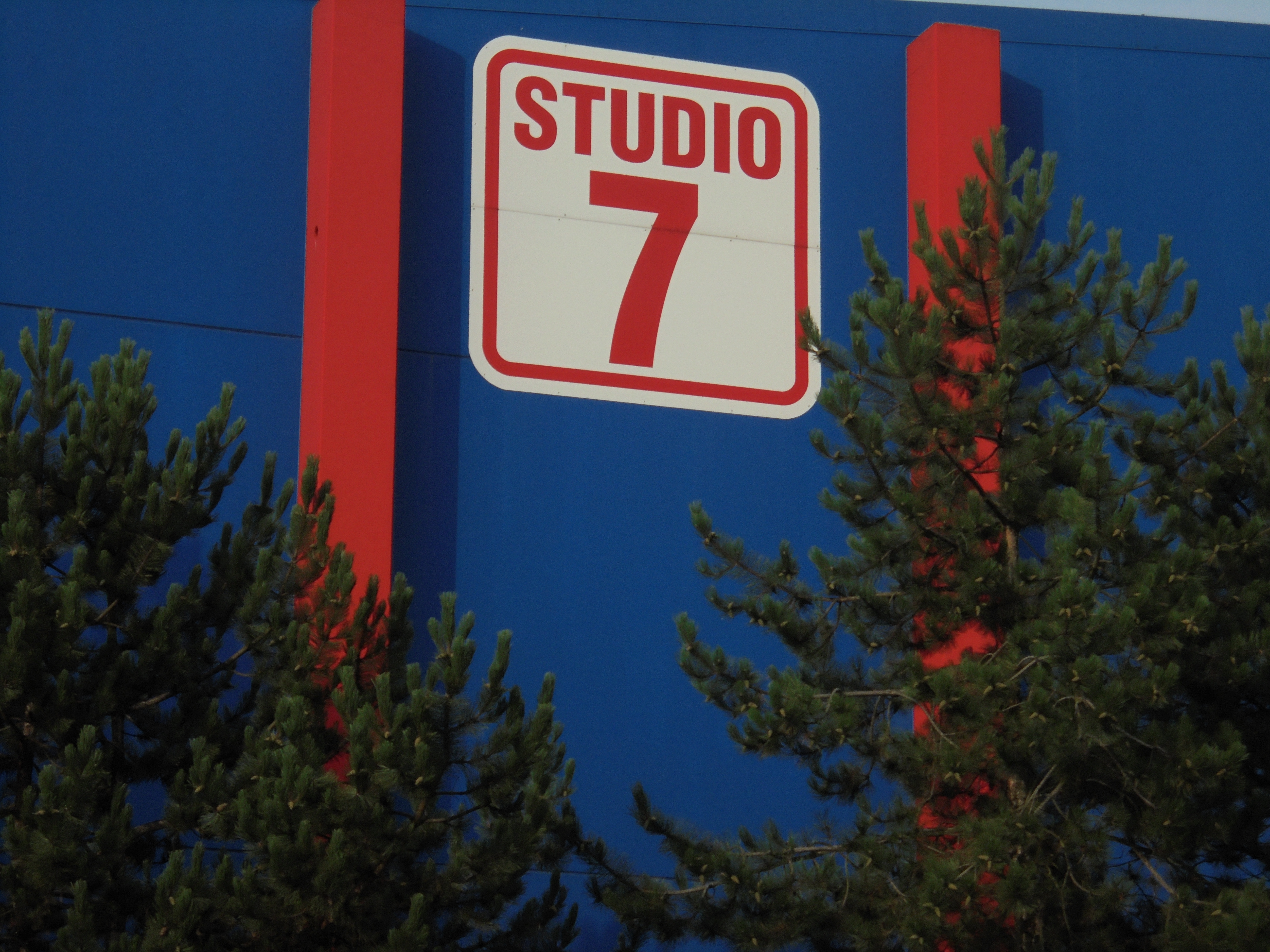 Studio 7 - Shadows of Darkness